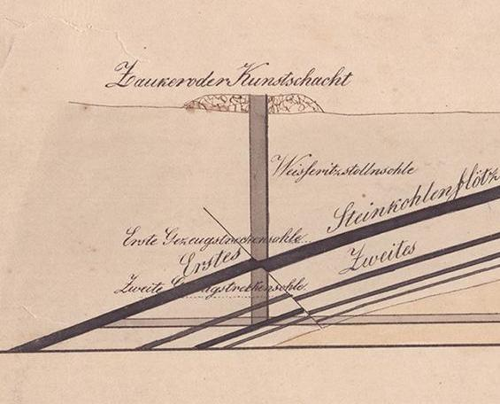 Zeichnung von dem Königlichen Elbstolln bei Brießnitz und demselben zwischen der Elbe und Zaukerode durchschnittenen Gebirge Gefertigt im Jahre 1831 von Ernst Wilhelm Lindig Anmerkung: Die bis Ende des Jahres 1831 aufgefahrenen Elbstollnlängen sind im horizontalen und verticalen Durchschnitte durch starke Linien angegeben worden. Topographischer Grundriß nach dem Maaßstabe I.